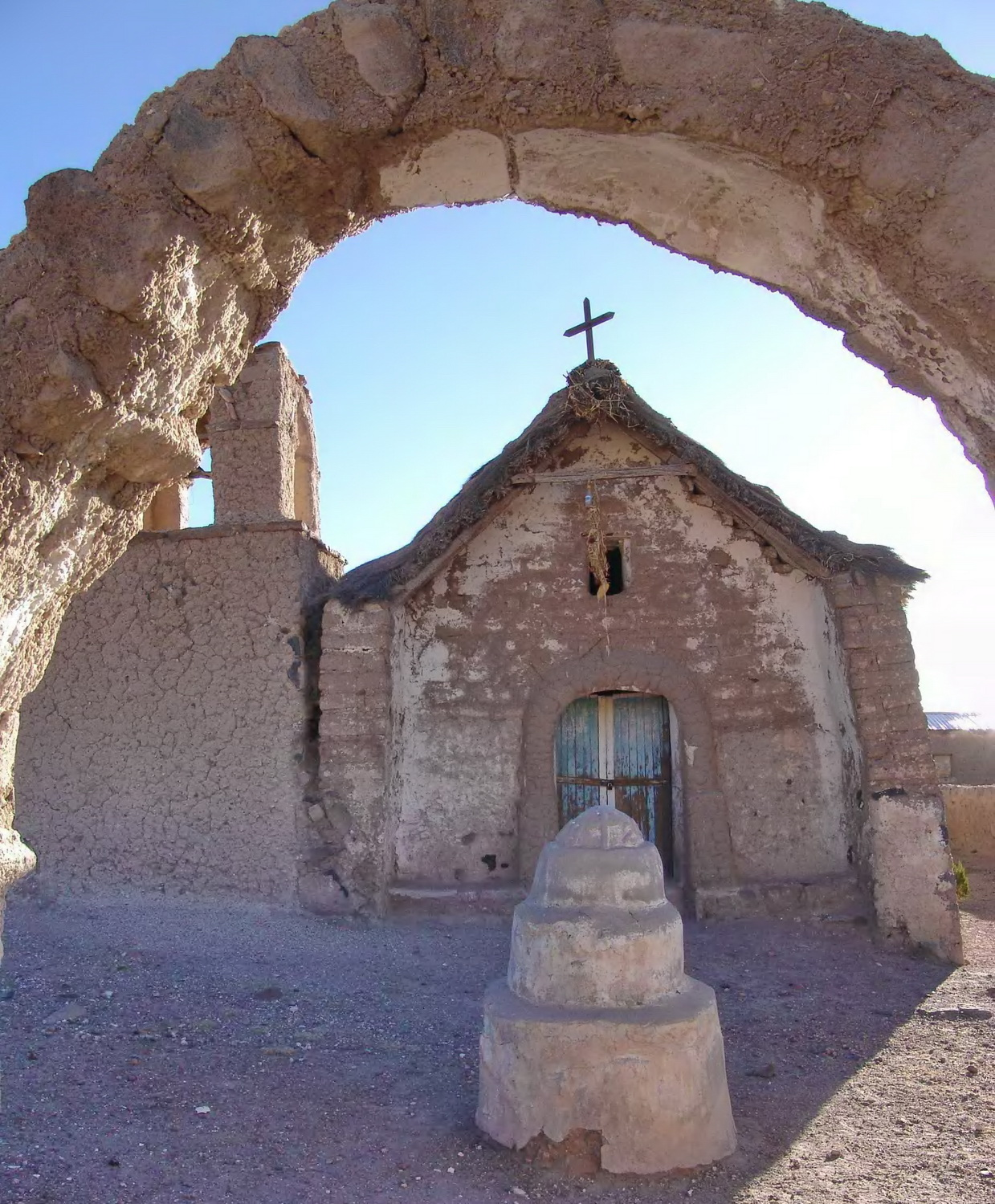 Iglesia de Parcohailla This is a photo of a national monument in Chile: 2060